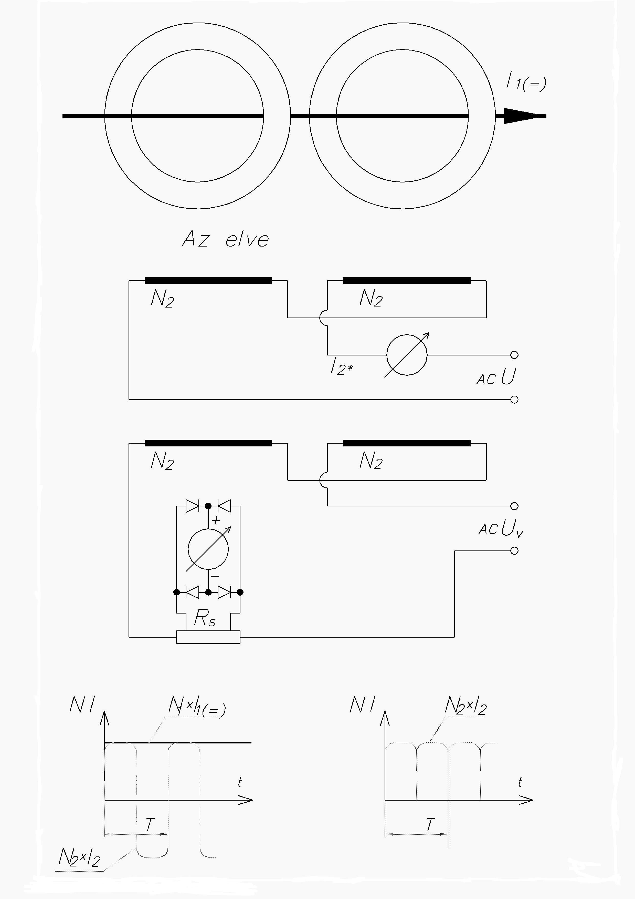 Egyenáramú áramváltó elvi kapcsolási rajza.